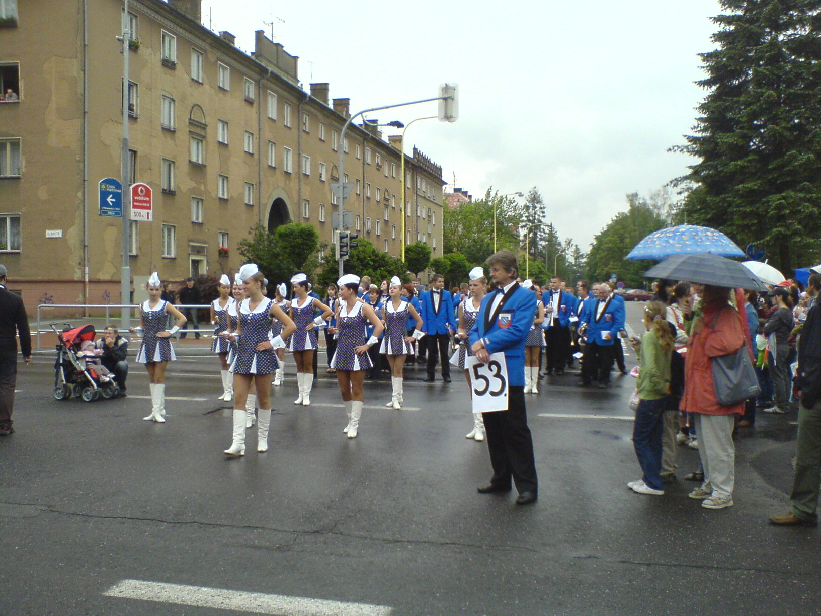 Mažoretky a dechová hudba na křižovatce Hlavní třídy a ulice Svornosti (Havířov v květech 2009)